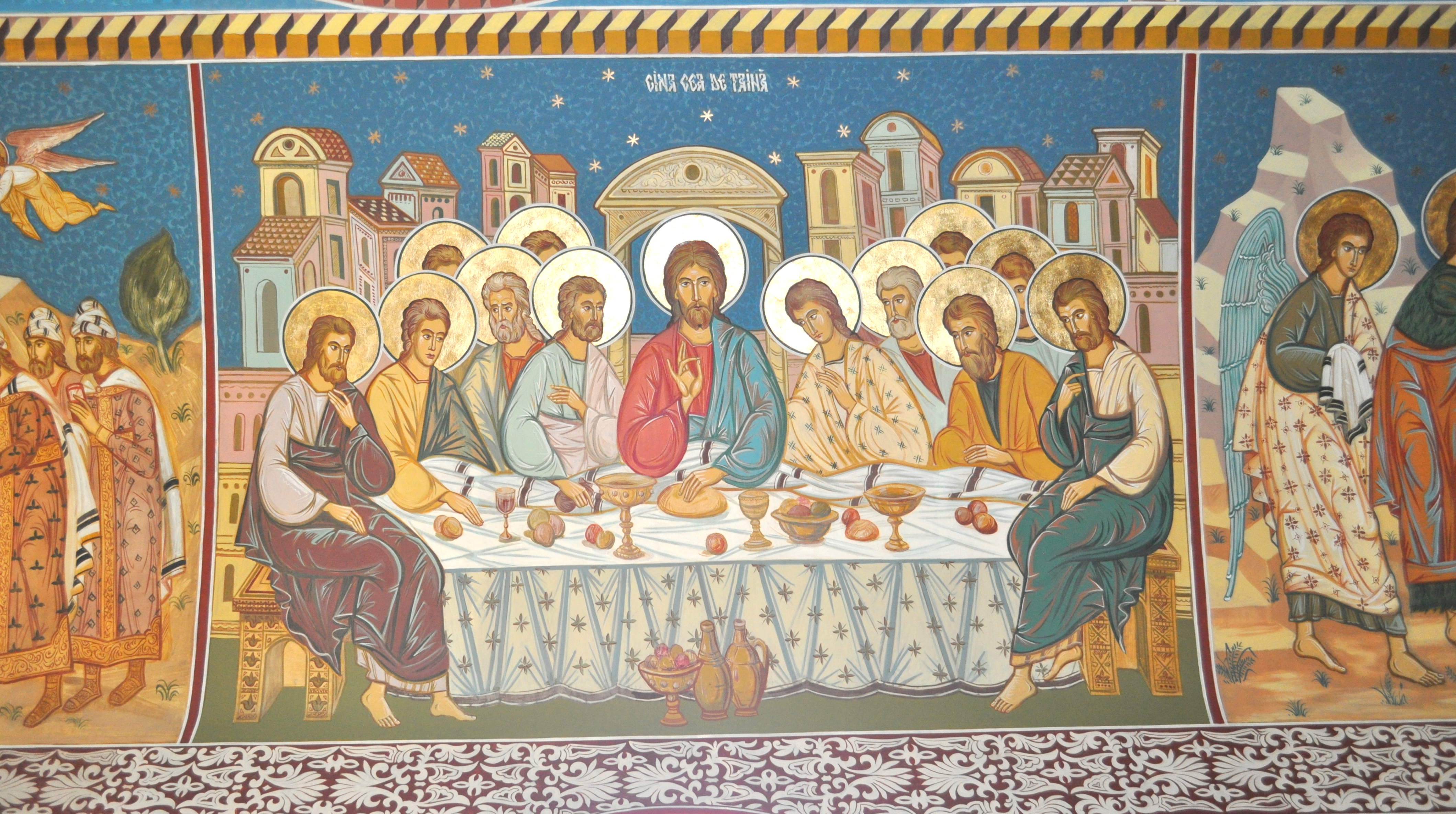 Biserica ortodoxă „Sf. Arhangheli Mihail și Gavriil”, sat Feldru; comuna Feldru